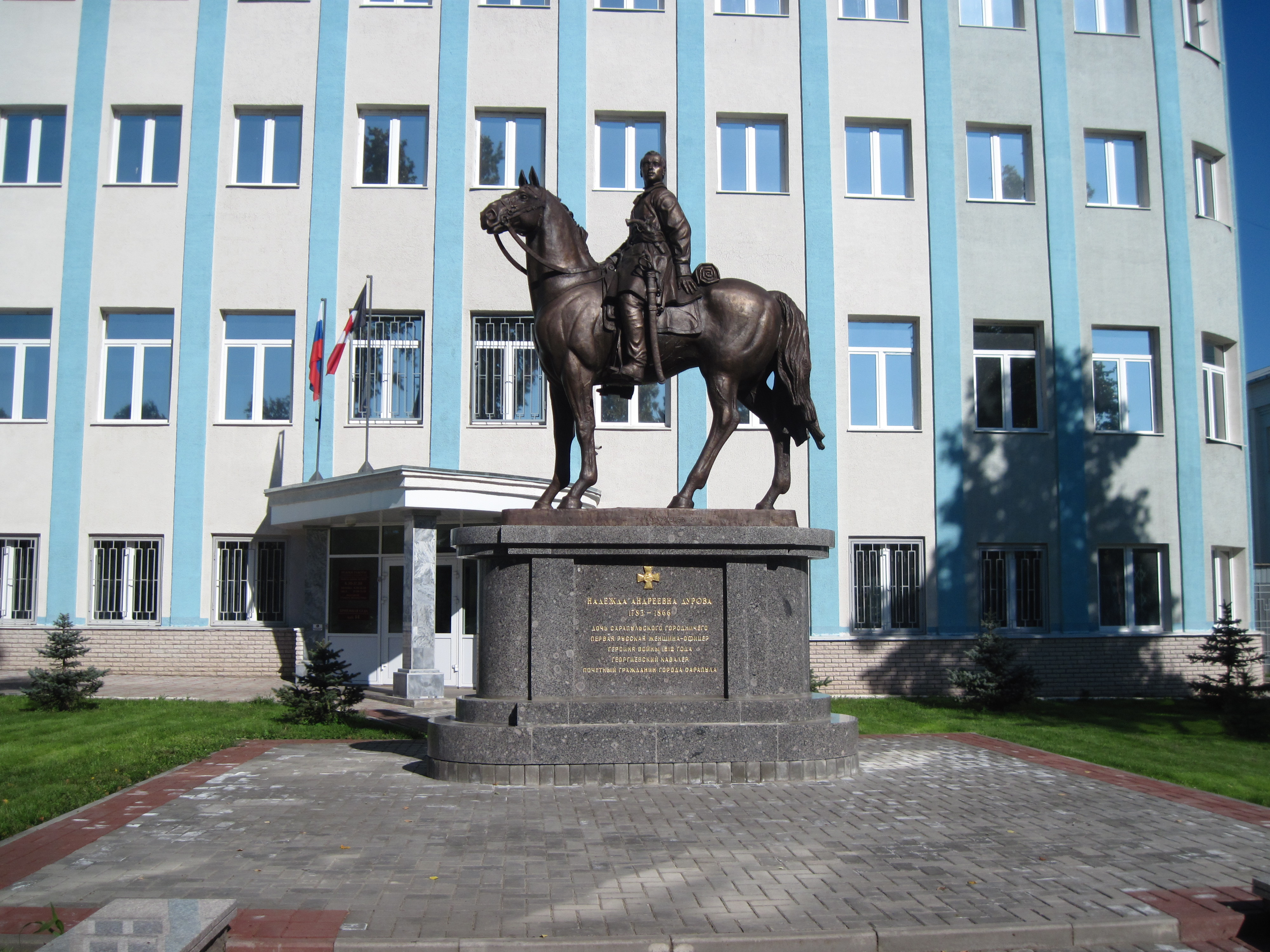 город Сарапул,Красная площадь,6